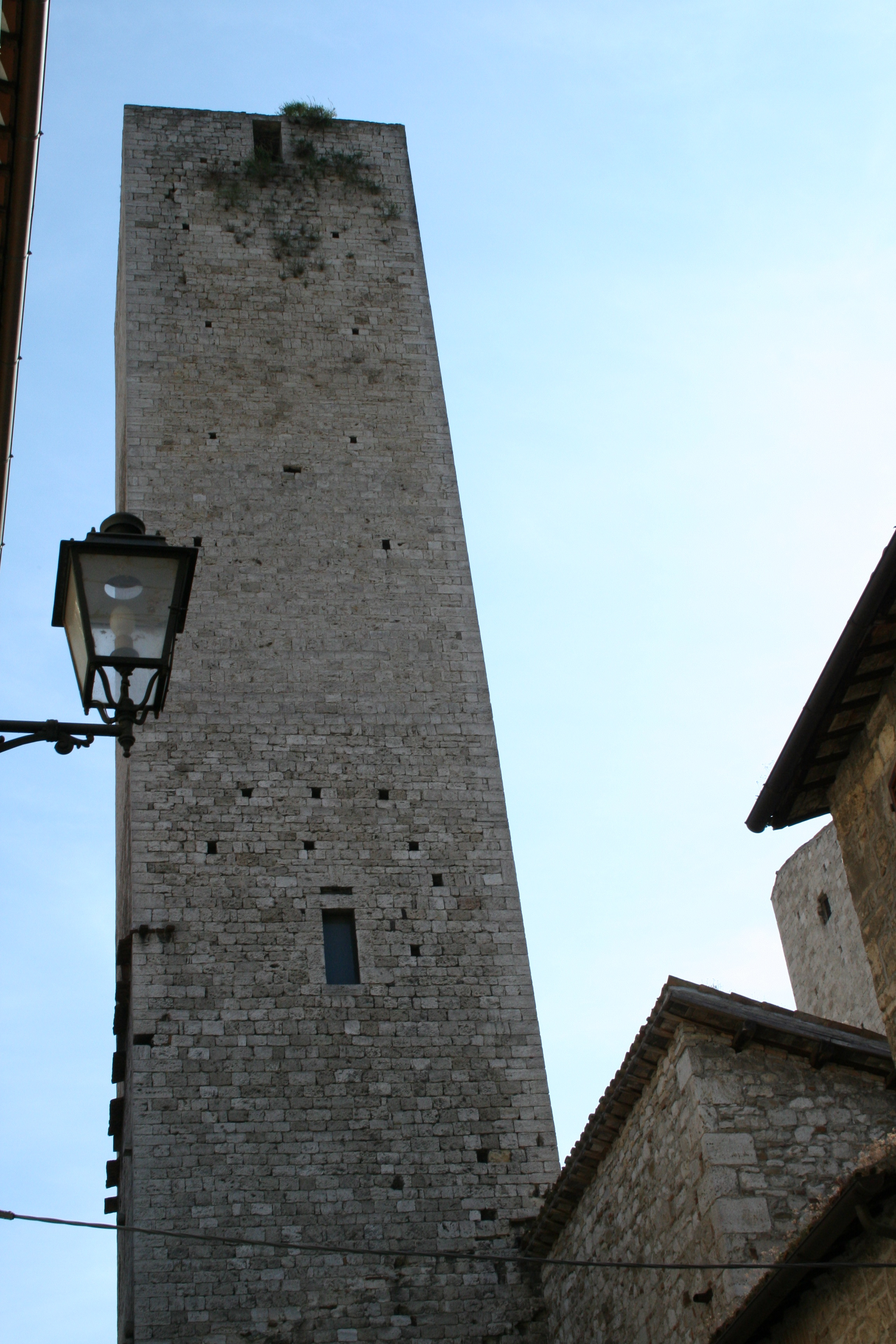 Torre Ercolani Ascoli Piceno, ottobre 2006 proprio scatto 2006-10-01 Sibilla.io "Utilizzo concesso" This file is licensed under Creative Commons 3.0 license